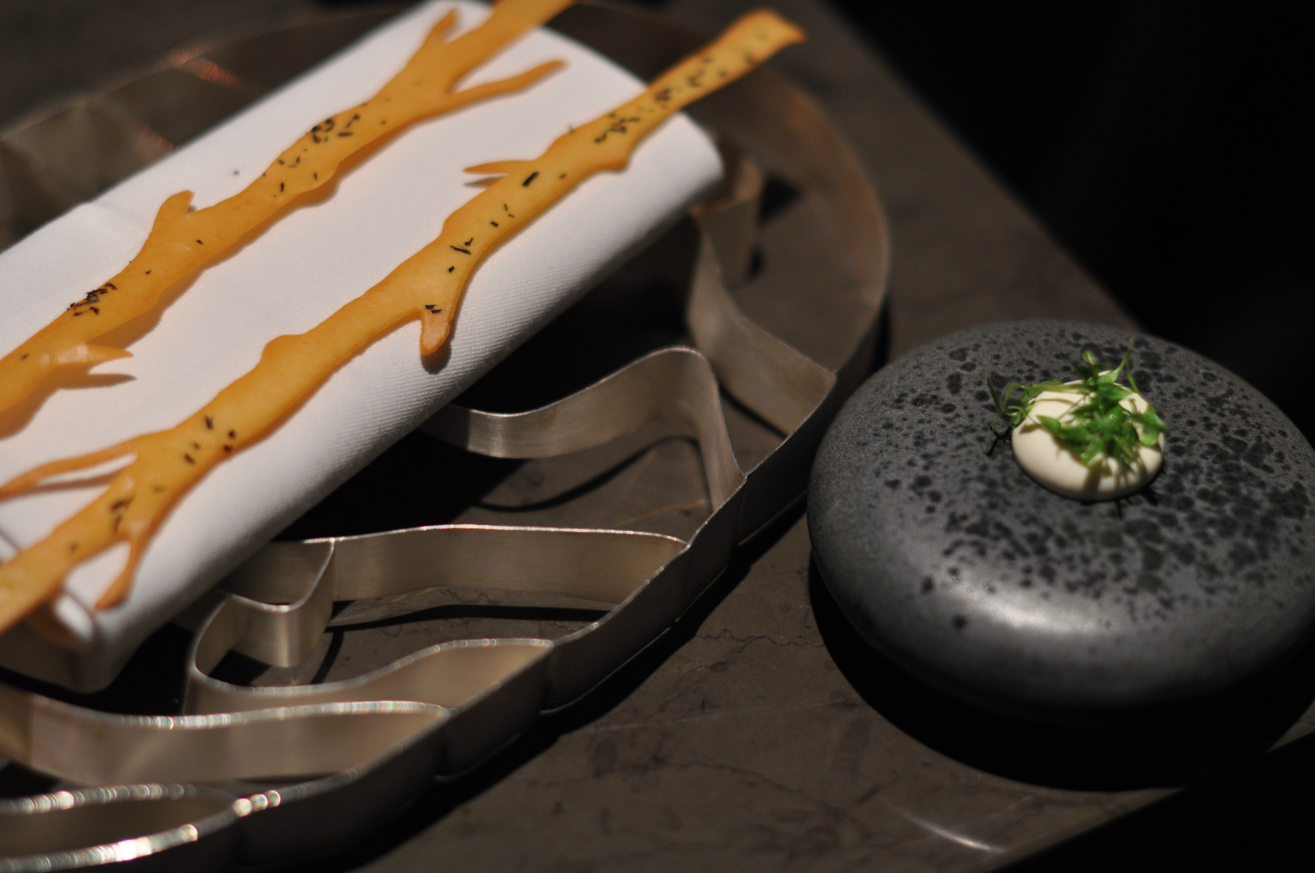 Grene af vesterhavsost med mousse af ramsløg